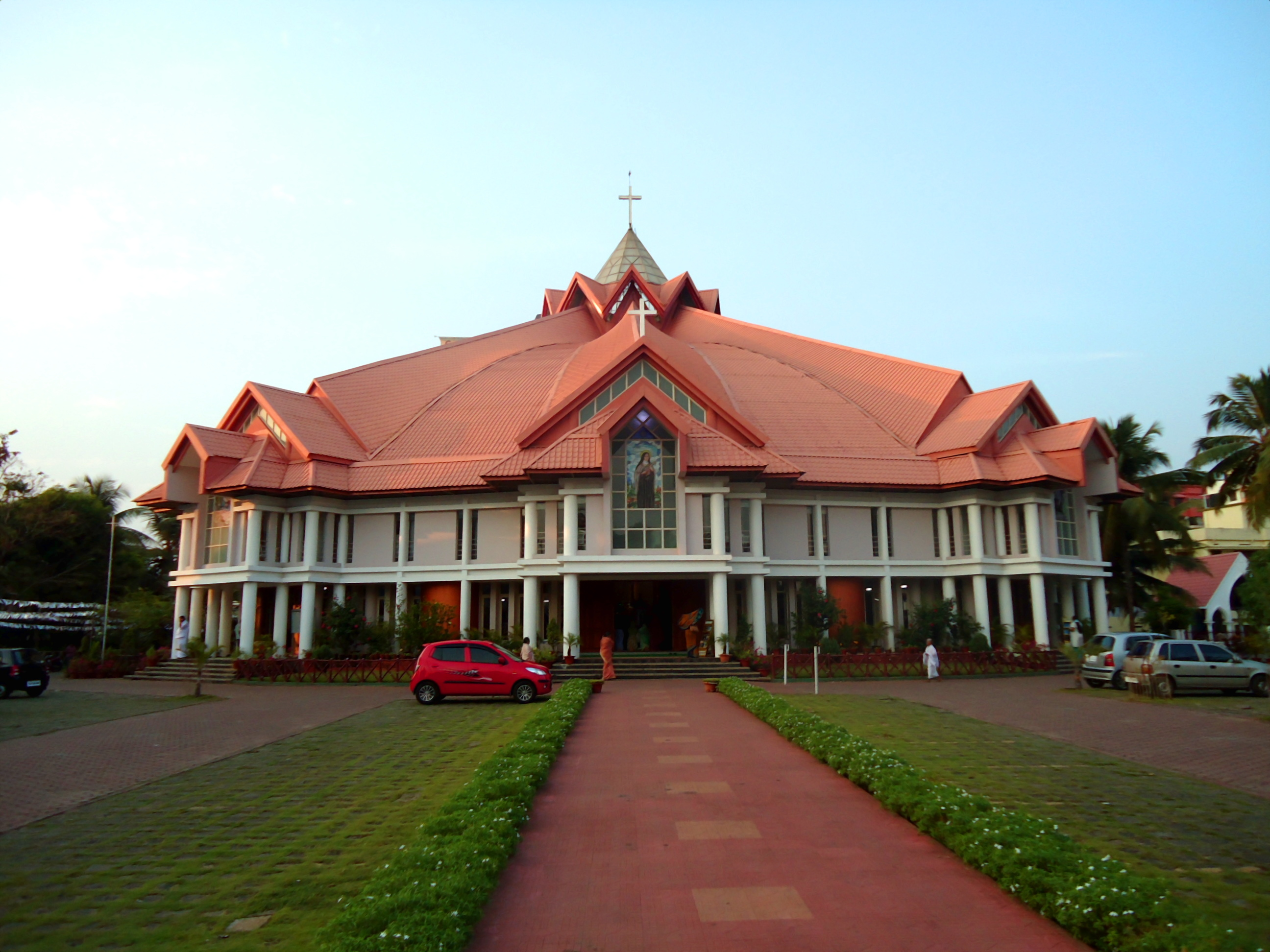 Little Flower Church Elamkulam Kochi